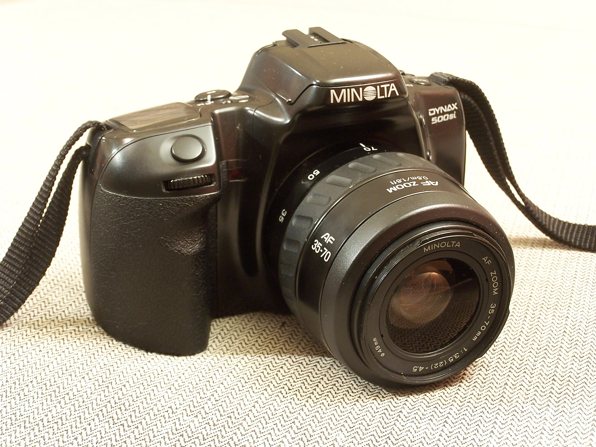 Konica Minolta Dynax 500si